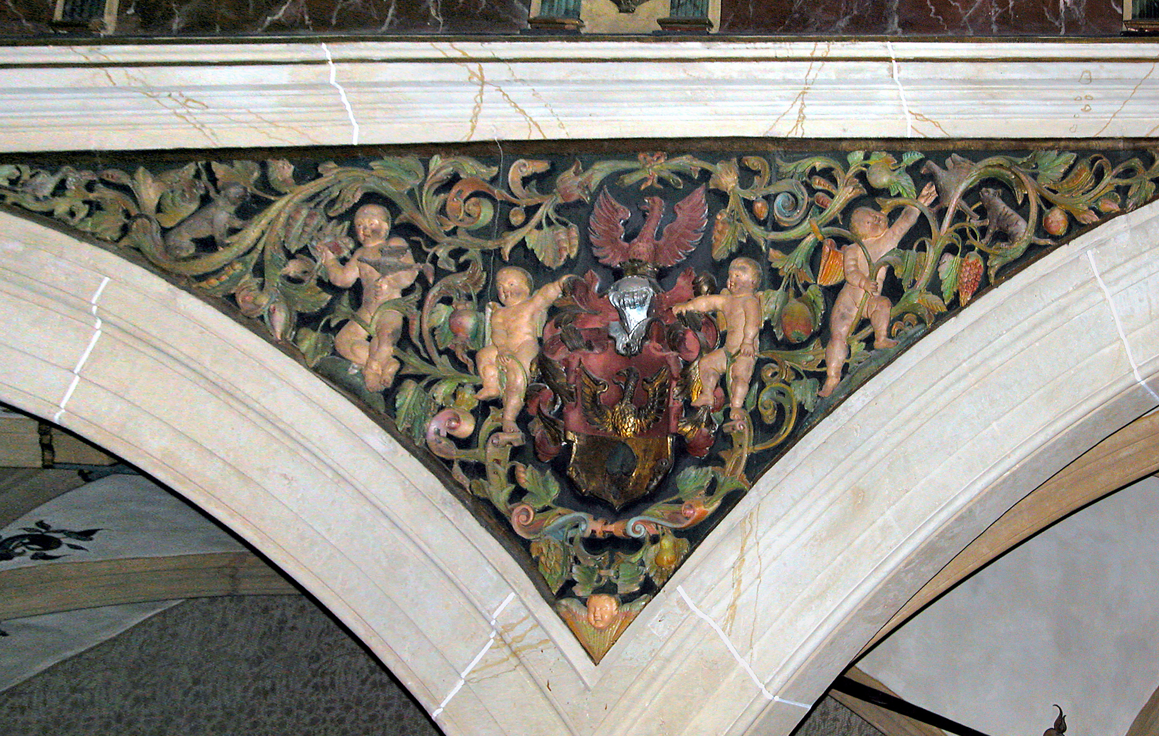 02.10.2008 01796 Pirna: Stadtkirche St. Marien, Kirchplatz (50.962419,13.943554). Heutiger Bau 1502-1546. Feld an der Nordempore [DSCN34385.TIF]20081002065DR.JPG(c)Blobelt